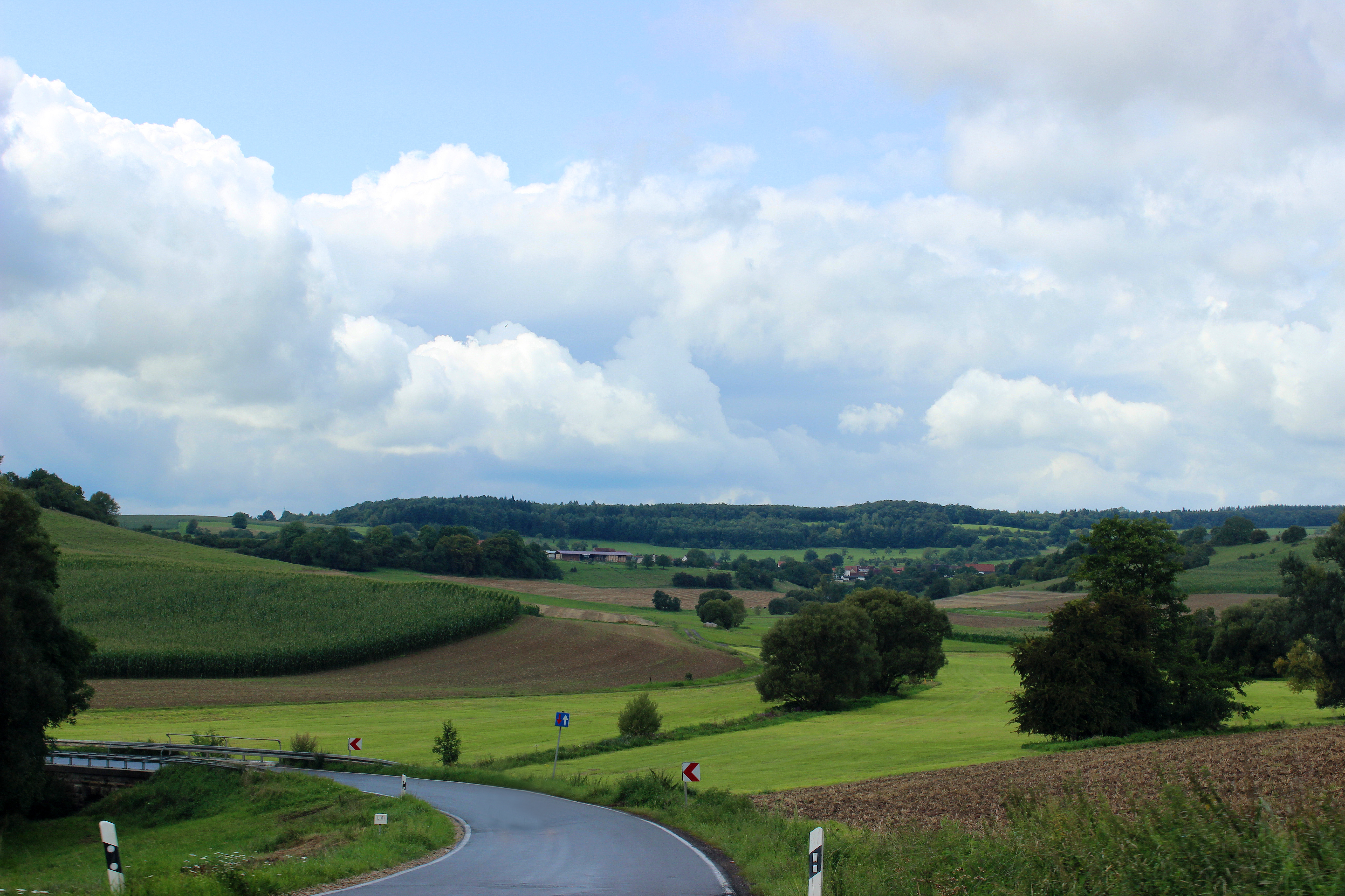 Bliesgaulandschaft bei Böckweiler, Saarland.